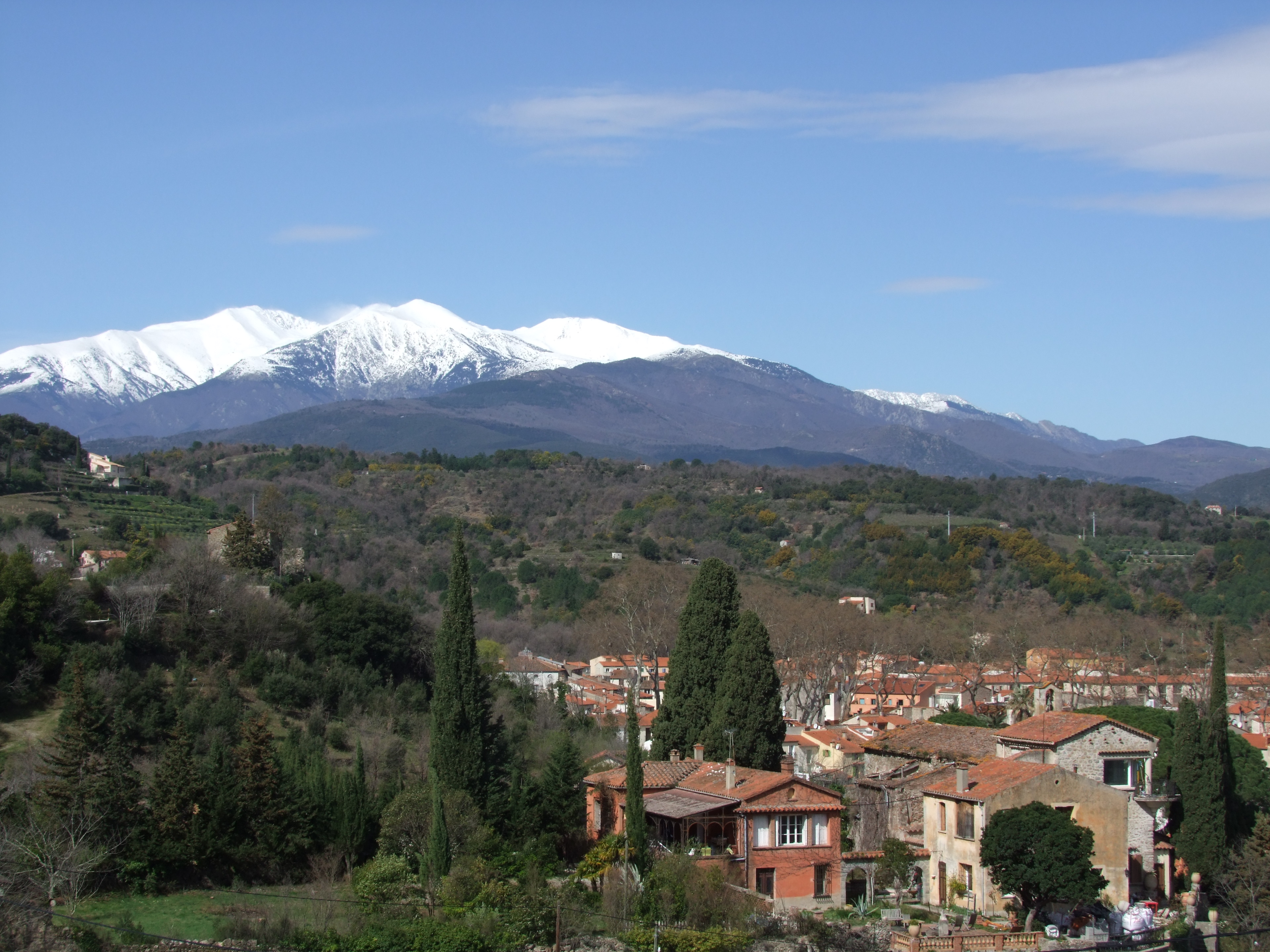 Site des Capucins et massif du Canigou au dessus de Céret